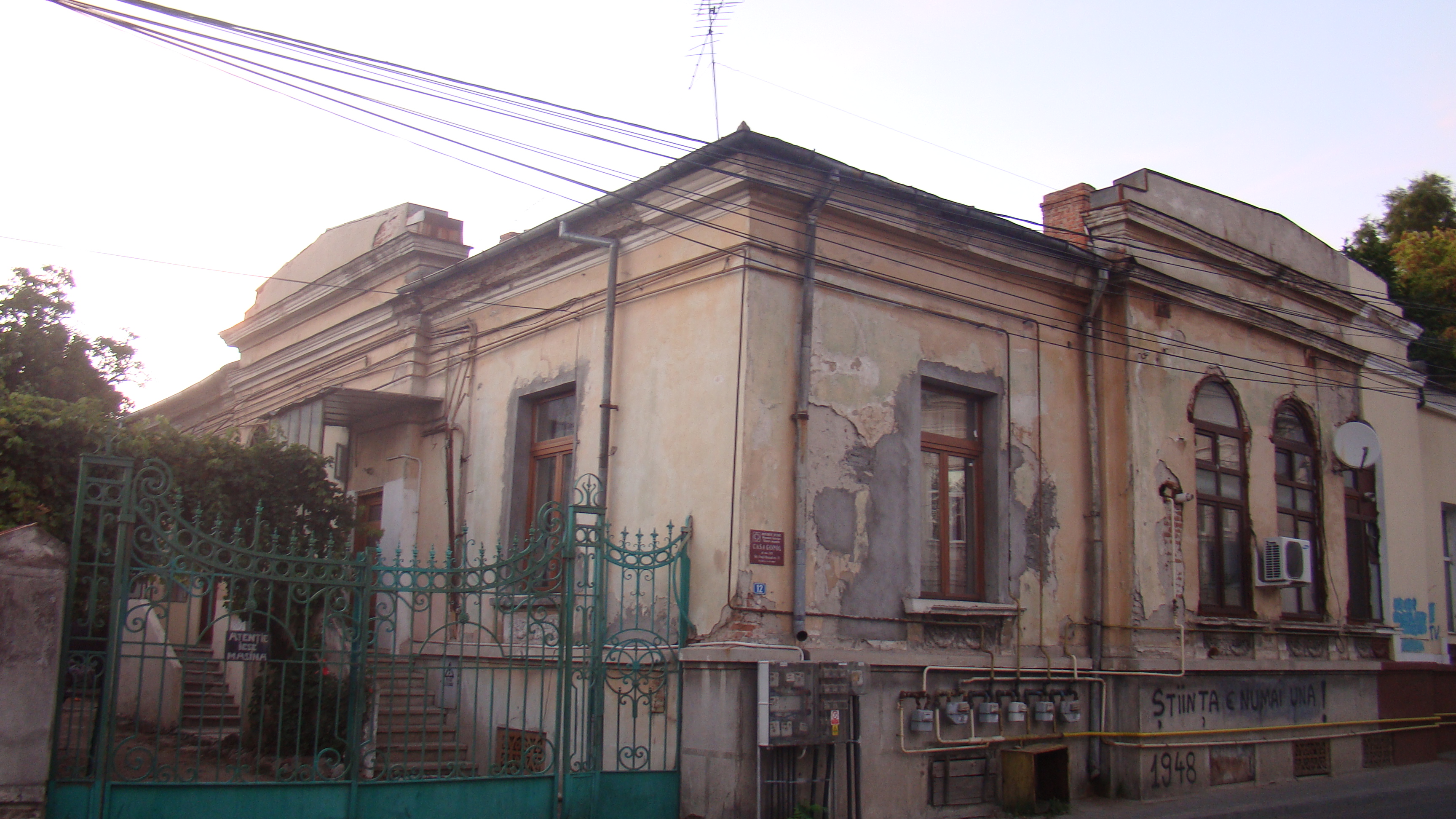 Casa Gogol